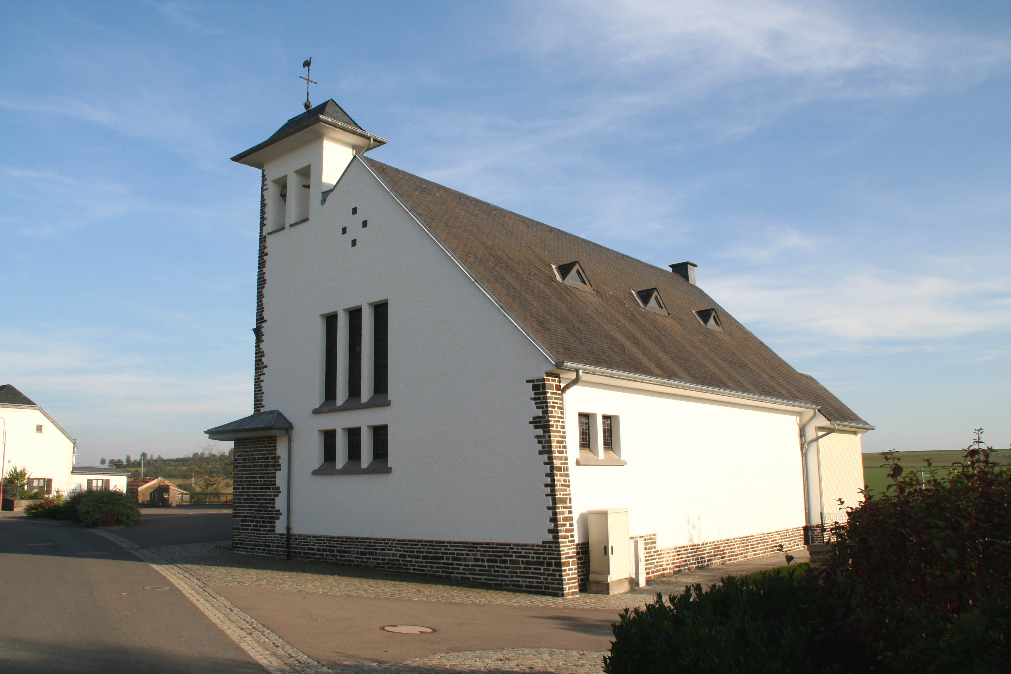 Sujet:Duerscht Kierch Eege Foto vum User:Cornischong Lizenz: GFDL